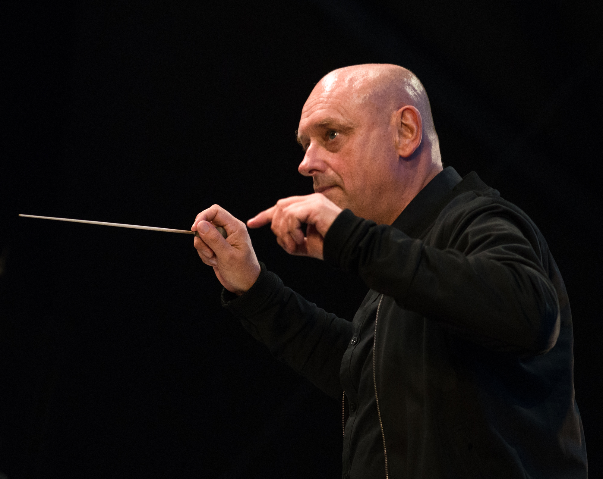 Hans Ek dirigerar Sveriges Radios Symfoniorkester i konserten ”Chelsea Hotel” under Stockholms Kulturfestival 2018.